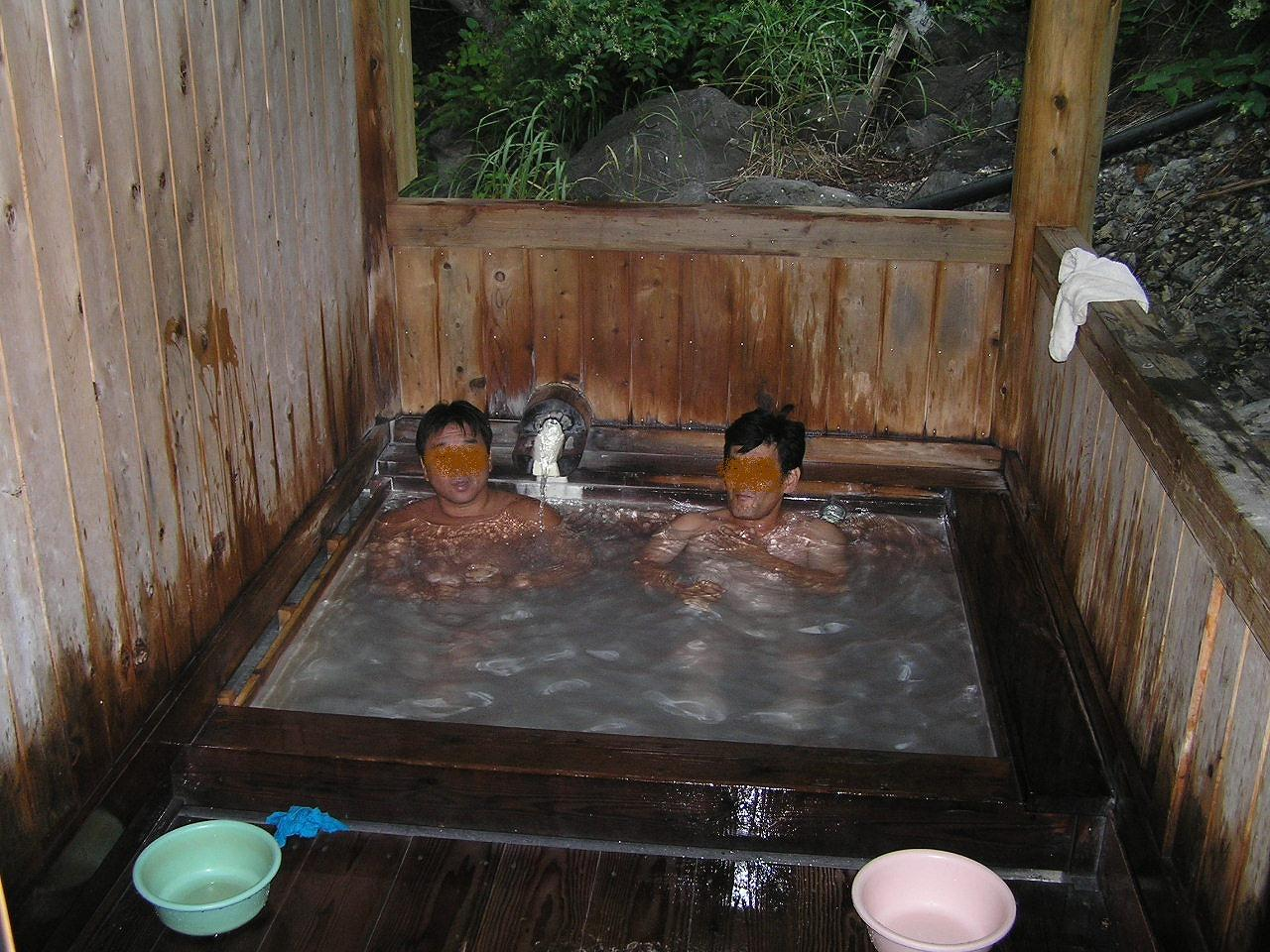 のりくら高原温泉郷・湯川温泉せせらぎの湯 ２人入浴